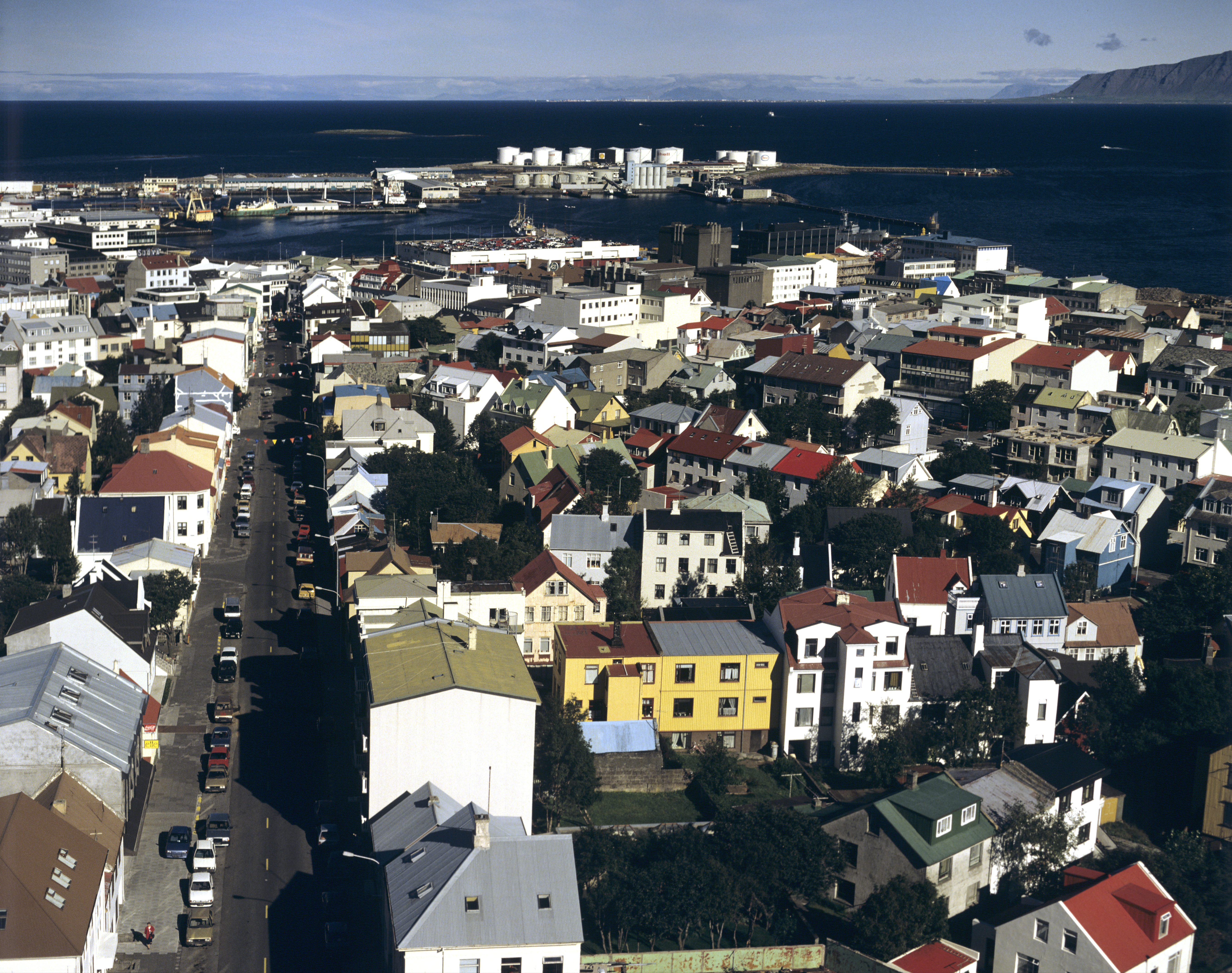 Skólavörðustígur zum Hafen hin.